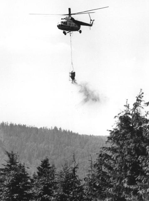 Agrarflieger, Düngen, Forstwirtschaft ADN-ZB Schaar 21.7.1987 Zum Beitrag: Dünger von oben für Thüringer Wälder-Arbeitsflugplätze für den Forstschutz am Rennsteig . Hubschrauber mit angehängtem Container beim Düngerstreuen über Wäldern am Rennsteig. 1987-0721-301N-Hierzu gehören die Fotos 1987-0721-300N302N1